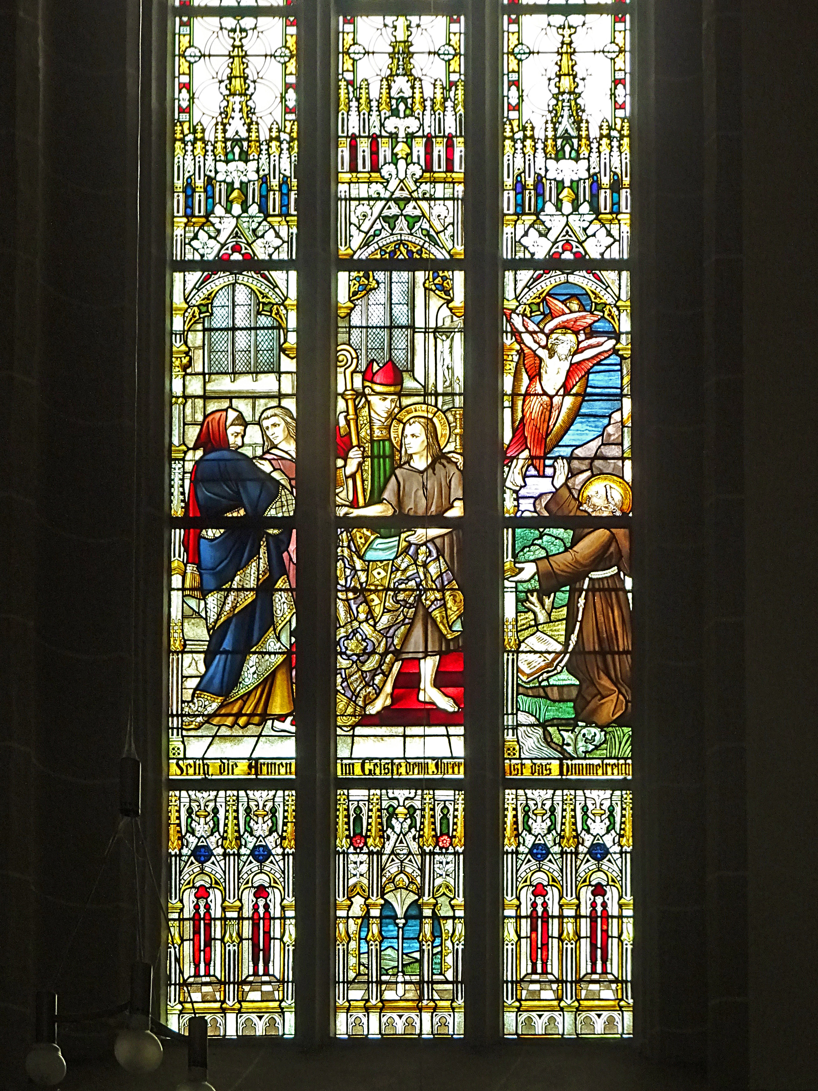 Buntglasfenster in der Pfarrkirche St. Gertrud (Dingelstädt) 1. Selig sind die Armen im Geiste, denn ihnen gehört das Himmelreich / Das Leben des hl. Franz von Assisi